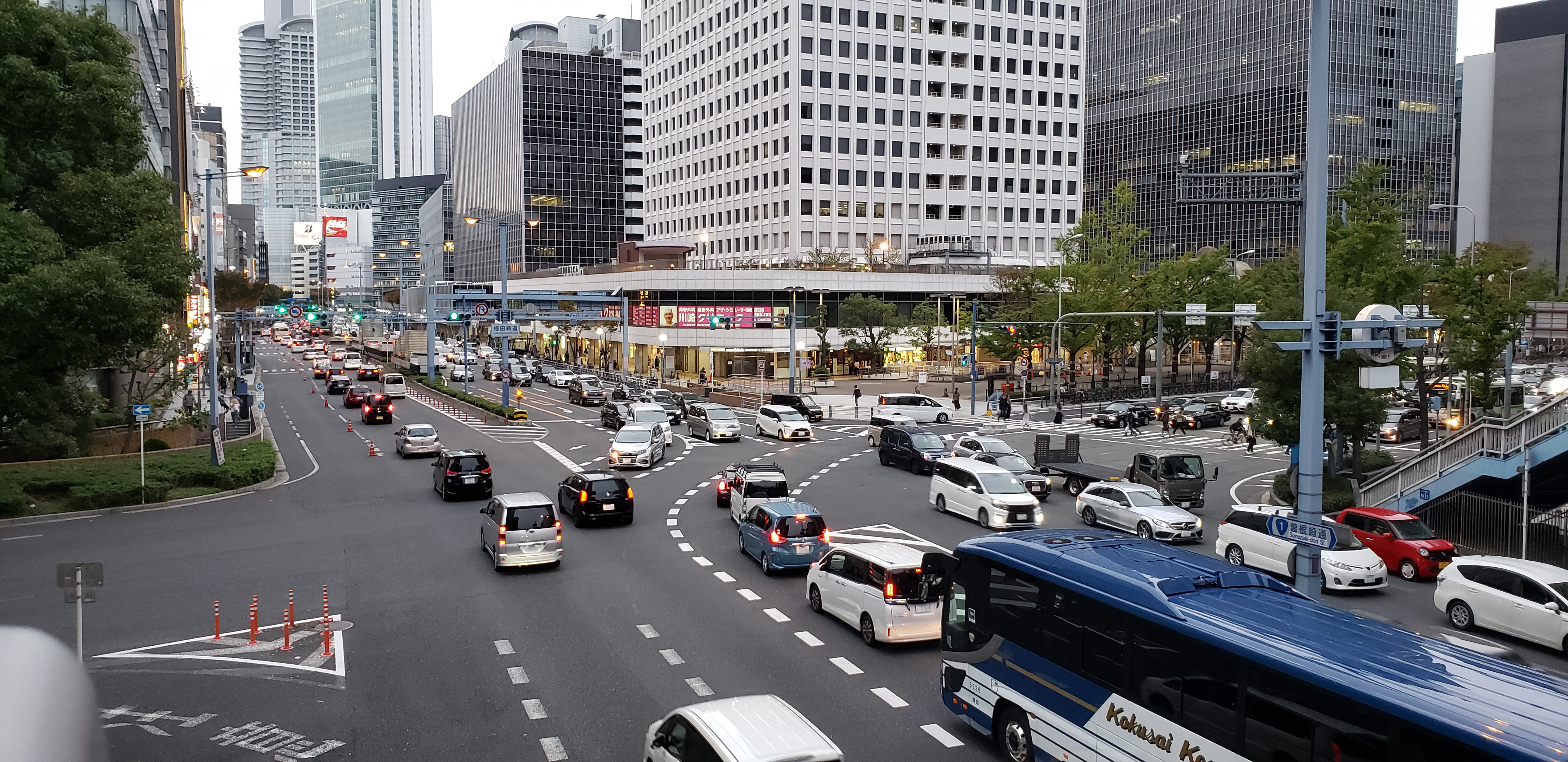 梅田新道交差点（歩道橋より西を見る）手前が国道1号、左が国道25号（御堂筋）、右が国道176号、この先向こうが国道2号である。